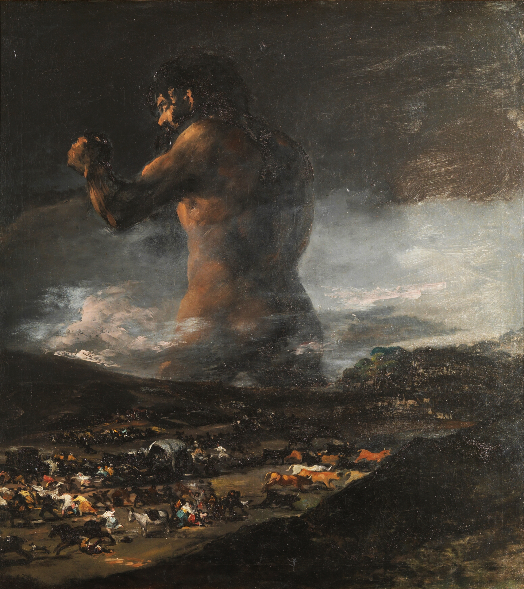 El colosoThe Colossuslabel QS:Les,"El coloso"label QS:Len,"The Colossus"